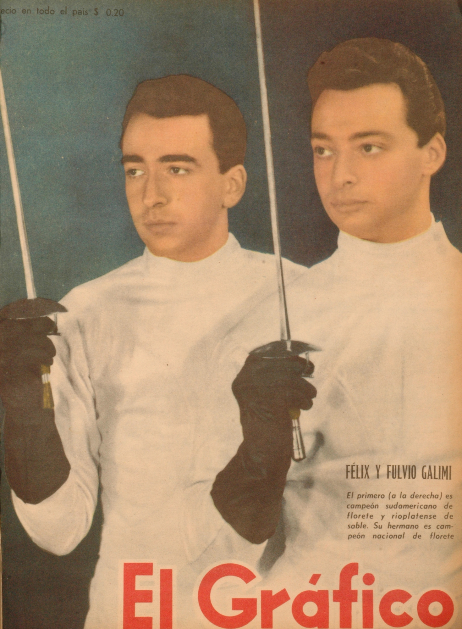 El Grafico del 09 de Mayo de 1947. Edicion 1452